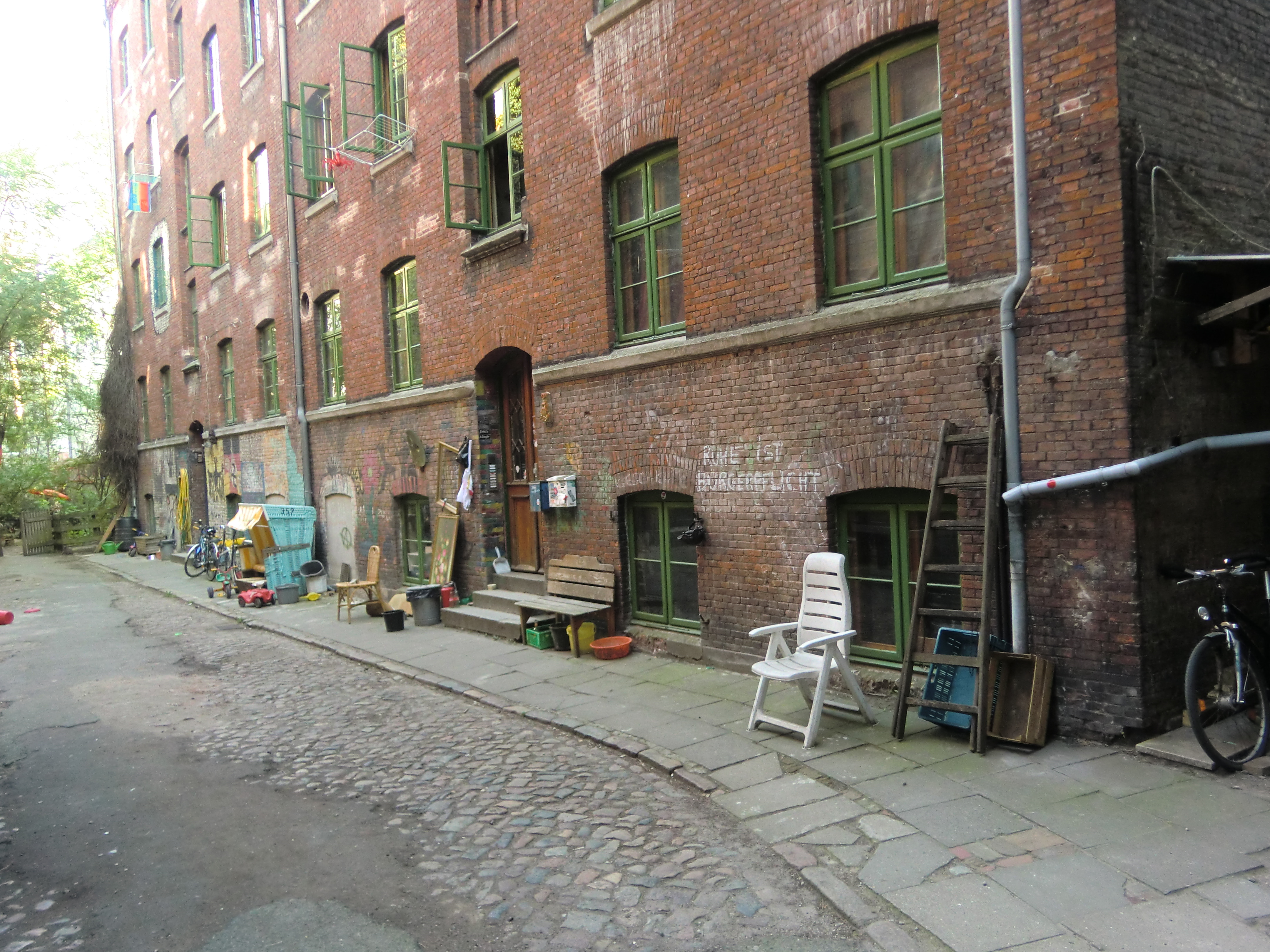 Hauseingang, der auf dem Cover zu John Lennons Album Rock ’n’ Roll zu sehen ist. Anschrift: Wohlwillstraße 22, Jägerpassage 1, Hamburg. Während des Gastspiels im Top-Ten-Club 1961 fotografierte Jürgen Vollmer John Lennon im vorderen Hauseingang. Im hinteren Eingang, Jägerpassage 2 wurde Jackie Lomax, damals Mitglied der Liverpooler Band The Undertakers von Astrid Kirchherr fotografiert.